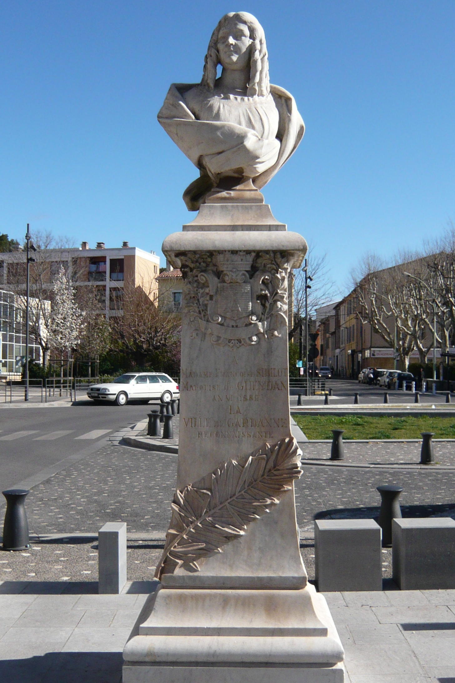 Statue dédiée à la marquise de Gueydan, cours de la République, Gardanne, Bouches-du-Rhône, France. "A Madame Françoise SIBILOT Marquise de Gueydan An VI 1882 LA VILLE DE GARDANNE RECONNAISSANTE"